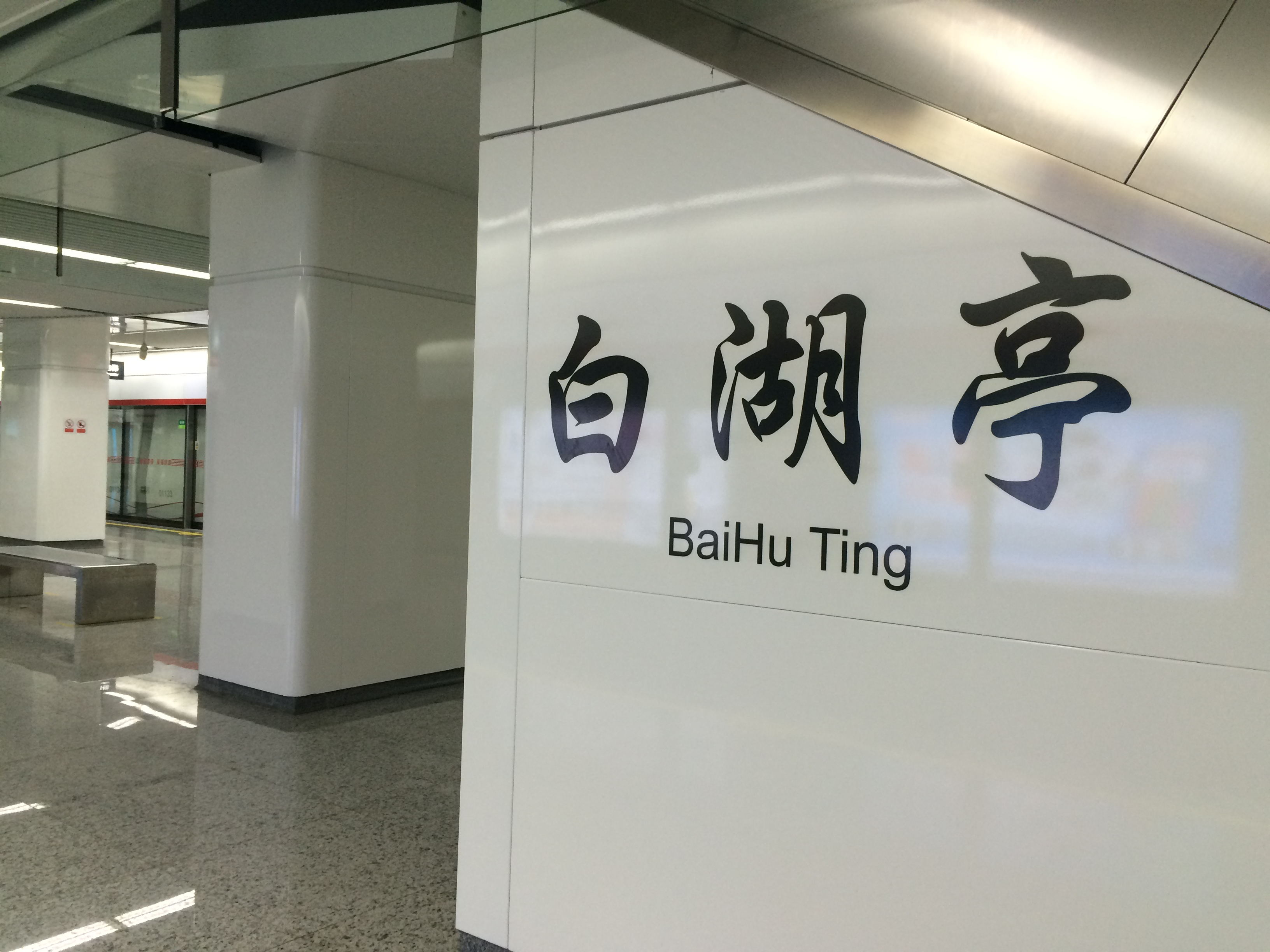 中文（中国大陆）: 白湖亭站站名壁